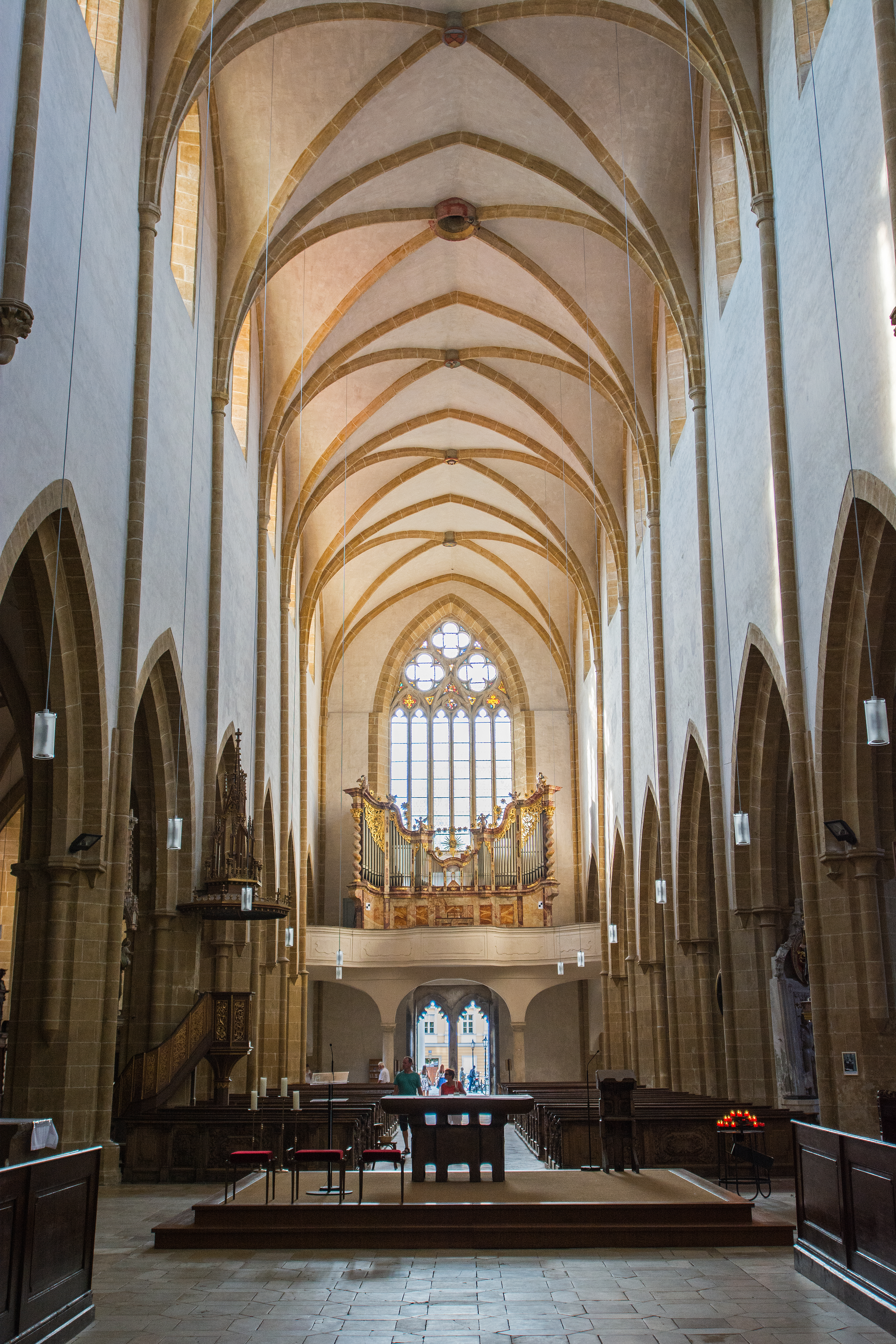 Die ehemalige Dominikanerkirche St. Blasius wurde von ca. 1246 bis 1384 erbaut (Chorbau vor 1246-79, Langhaus um 1280-1384). Sie ist die größte Kirche der Bettelorden in Süddeutschland. Langhaus mit Blick zur Orgelempore und Westportal. Untypisch für die Kirchen der sogenannten Bettelorden ist das durchgängig gewölbte Hauptschiff. D-3-62-000-24This is a photograph of an architectural monument.